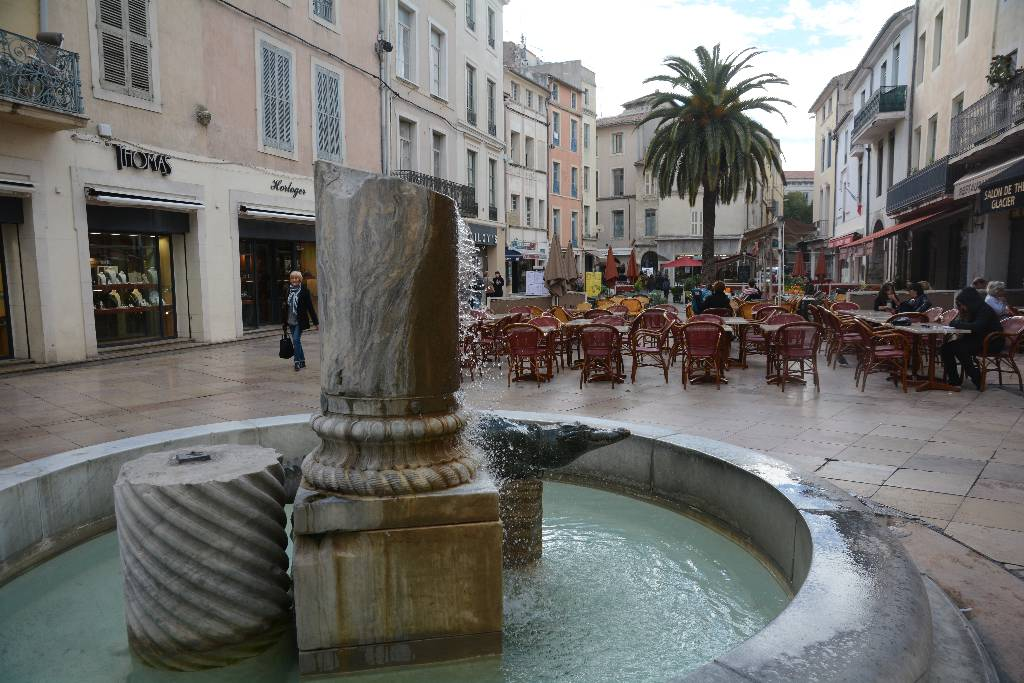 Fontaine Place du Marché